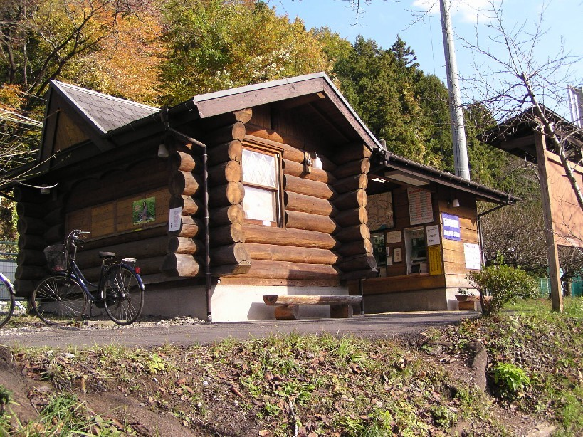 投稿者が撮影。撮影は2005年です。